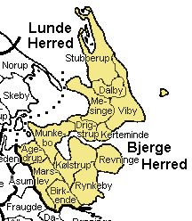 Bjerge Herred Odense Amt, Denmark.